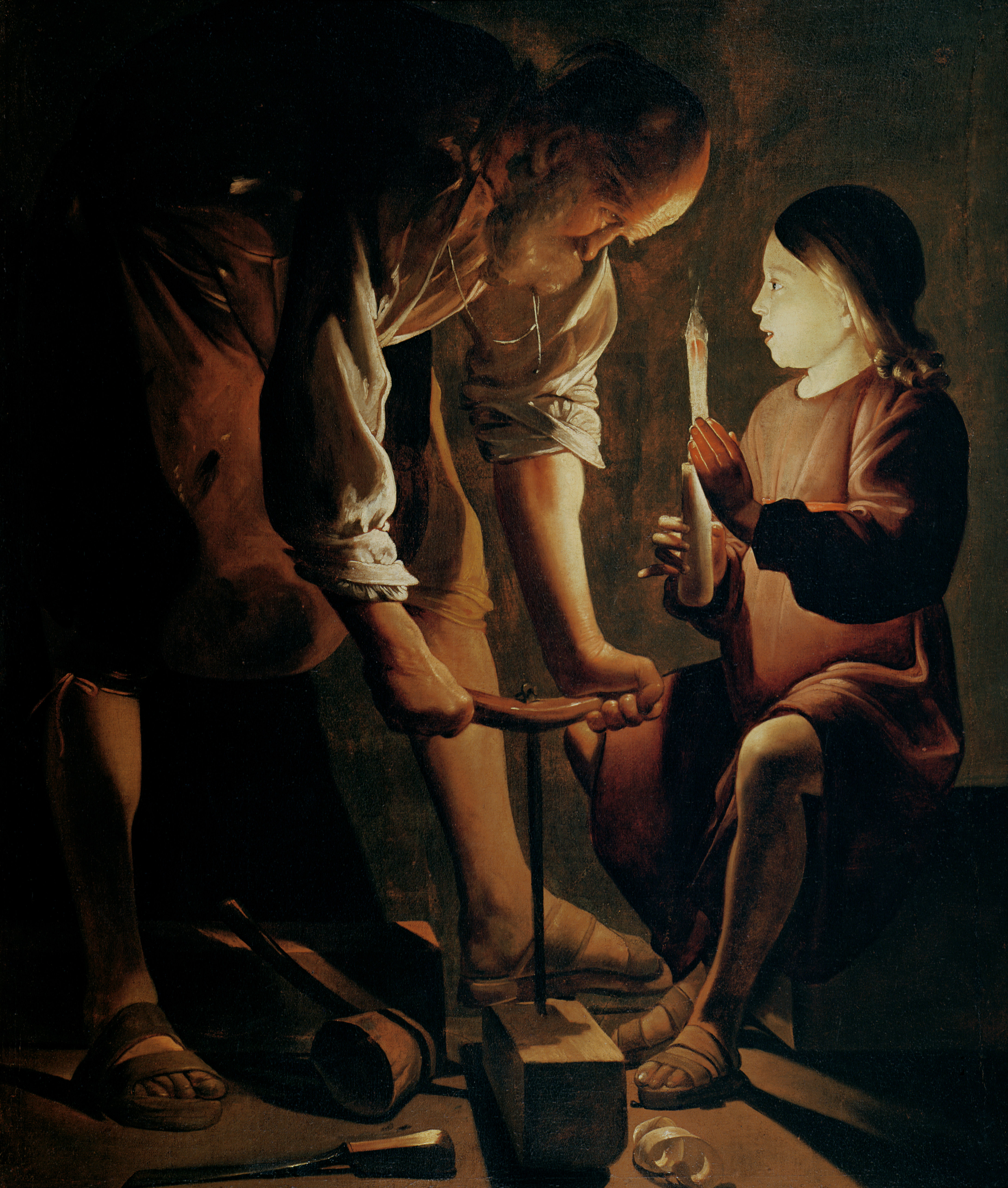 Saint Joseph, patron des charpentiers, travaille une poutre devant l'Enfant Jésus qui semble déjà y voir le bois de sa croix.